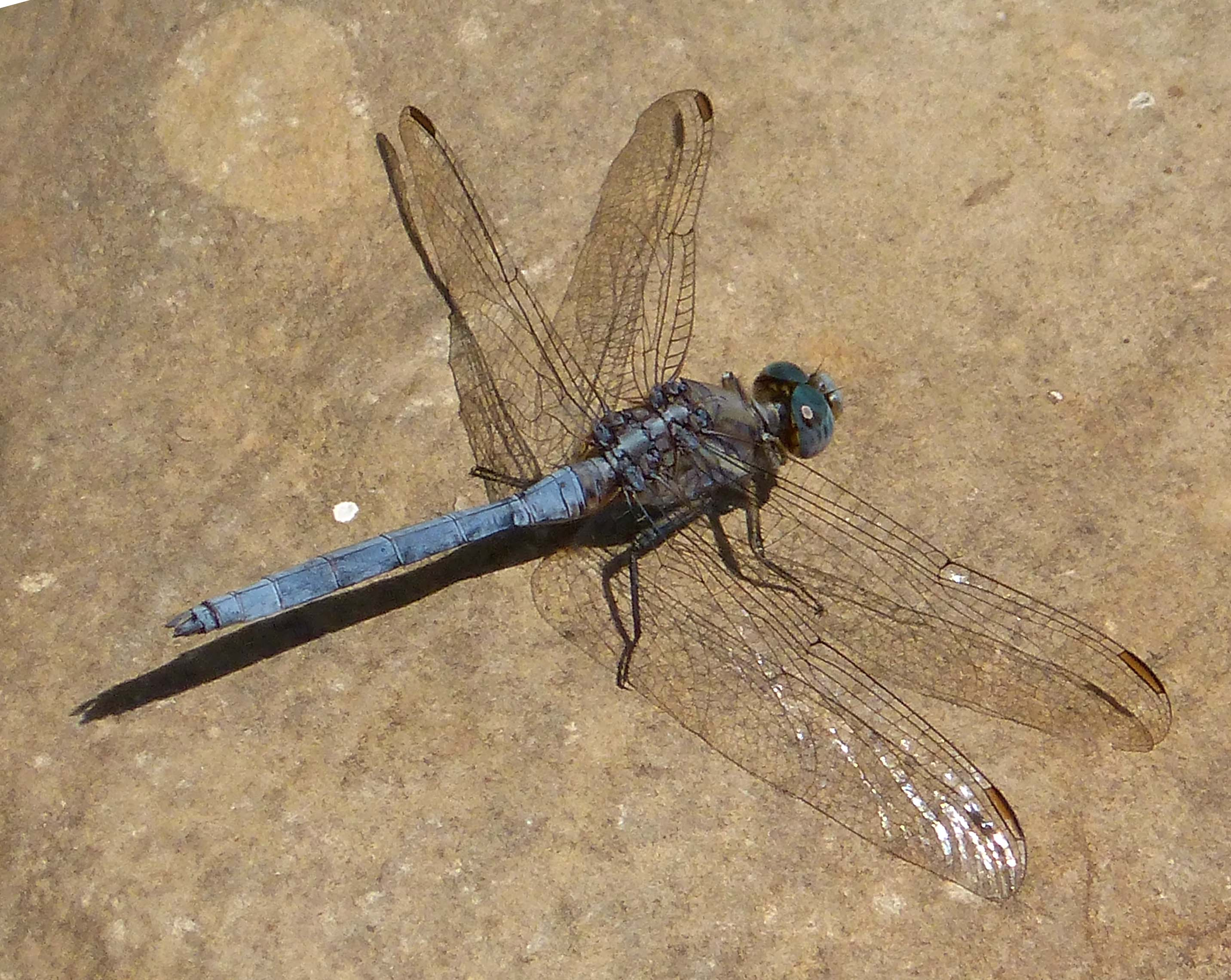 Alcornocales N.P. Andalucia, Spain.